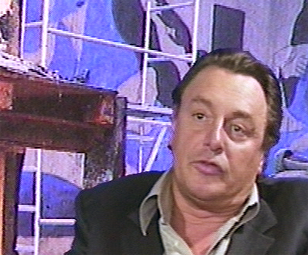 Portrait de Gérard Garouste